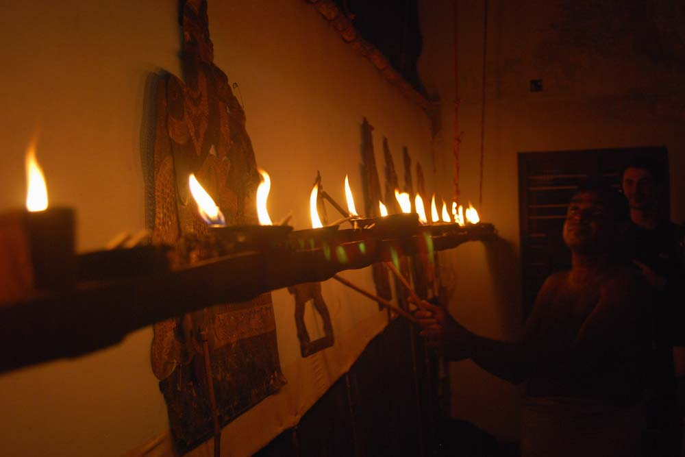 തോൽപ്പാവക്കൂത്ത് അവതരിപ്പിക്കുന്ന രീതി (തിരശ്ശീലയ്ക്കു പിന്നിൽ)